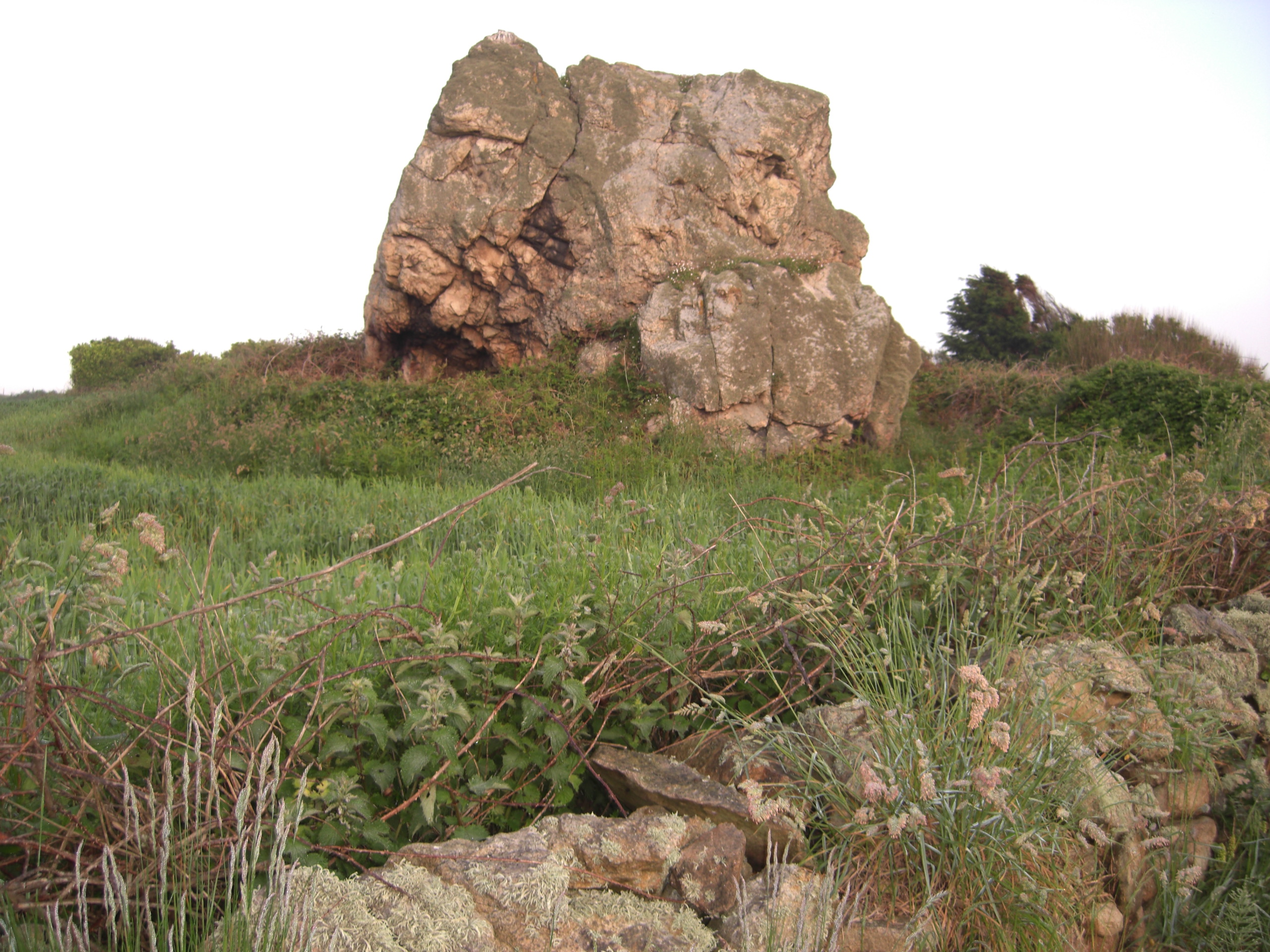 Rocher Geletan Saint-Germain-des-Vaux